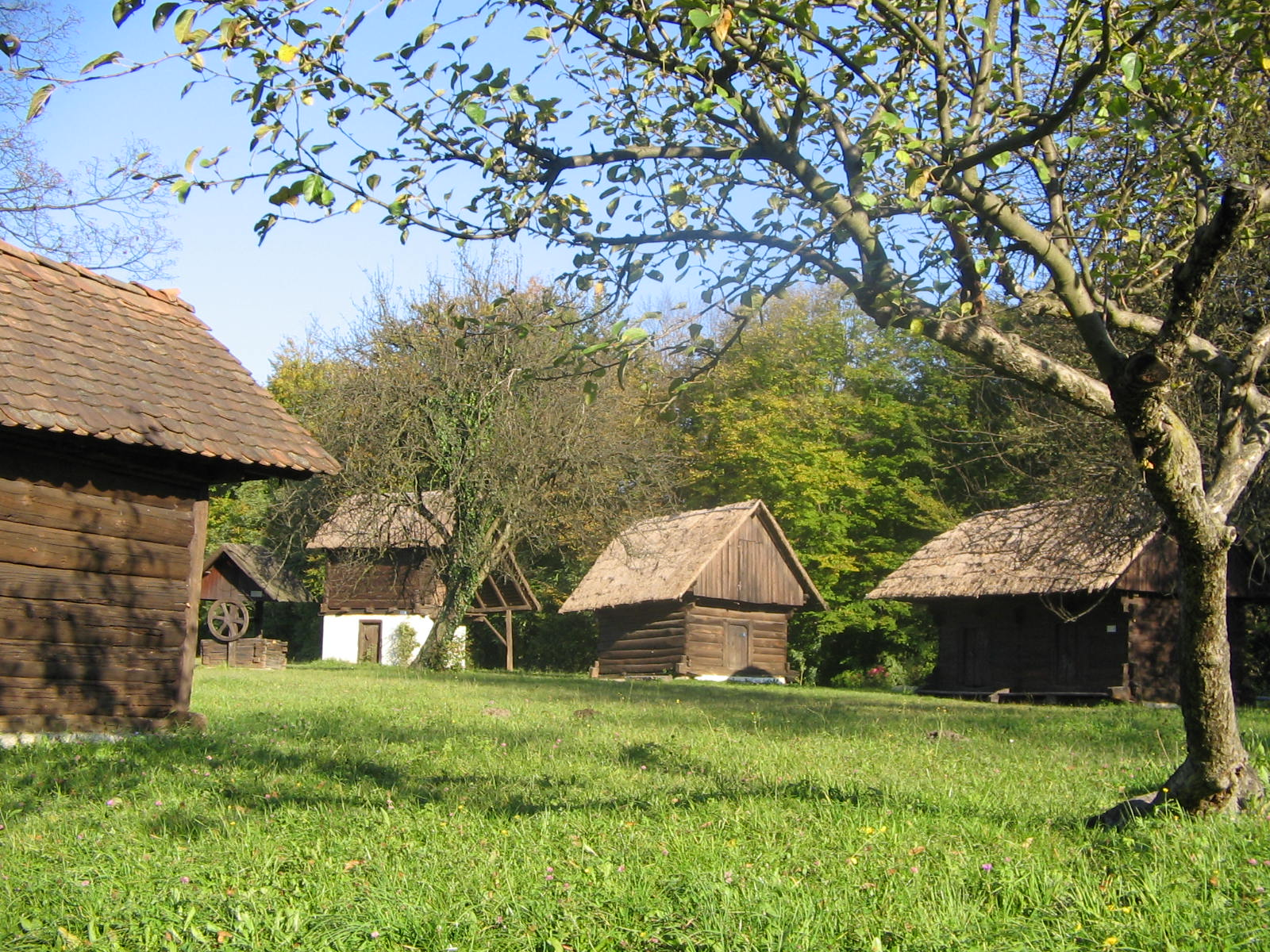 Open air museum Zaprice, Quelle: eigene Aufnahme 18. 10. 2005 Fotograf: Janez Novak, Ljubljana, Slovenija